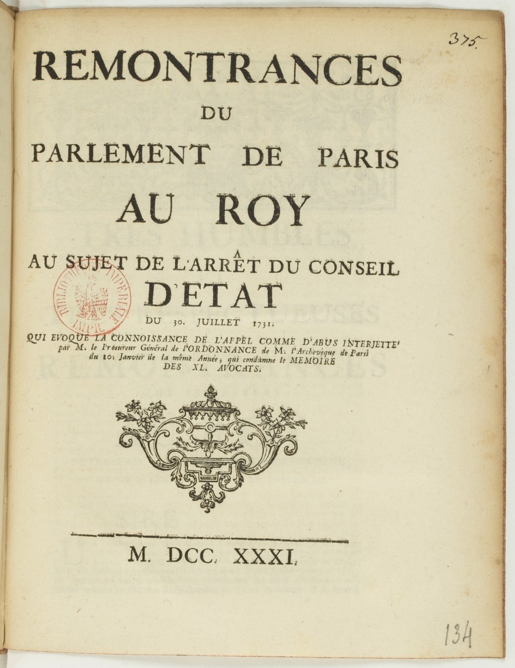 Remontrances du Parlement de Paris à Louis XV au sujet d'un arrêt du Conseil d'État favorable à l'archevêque de Paris dans son conflit avec certains avocats défendant les curés "appelants" du diocèse d'Orléans, 1731